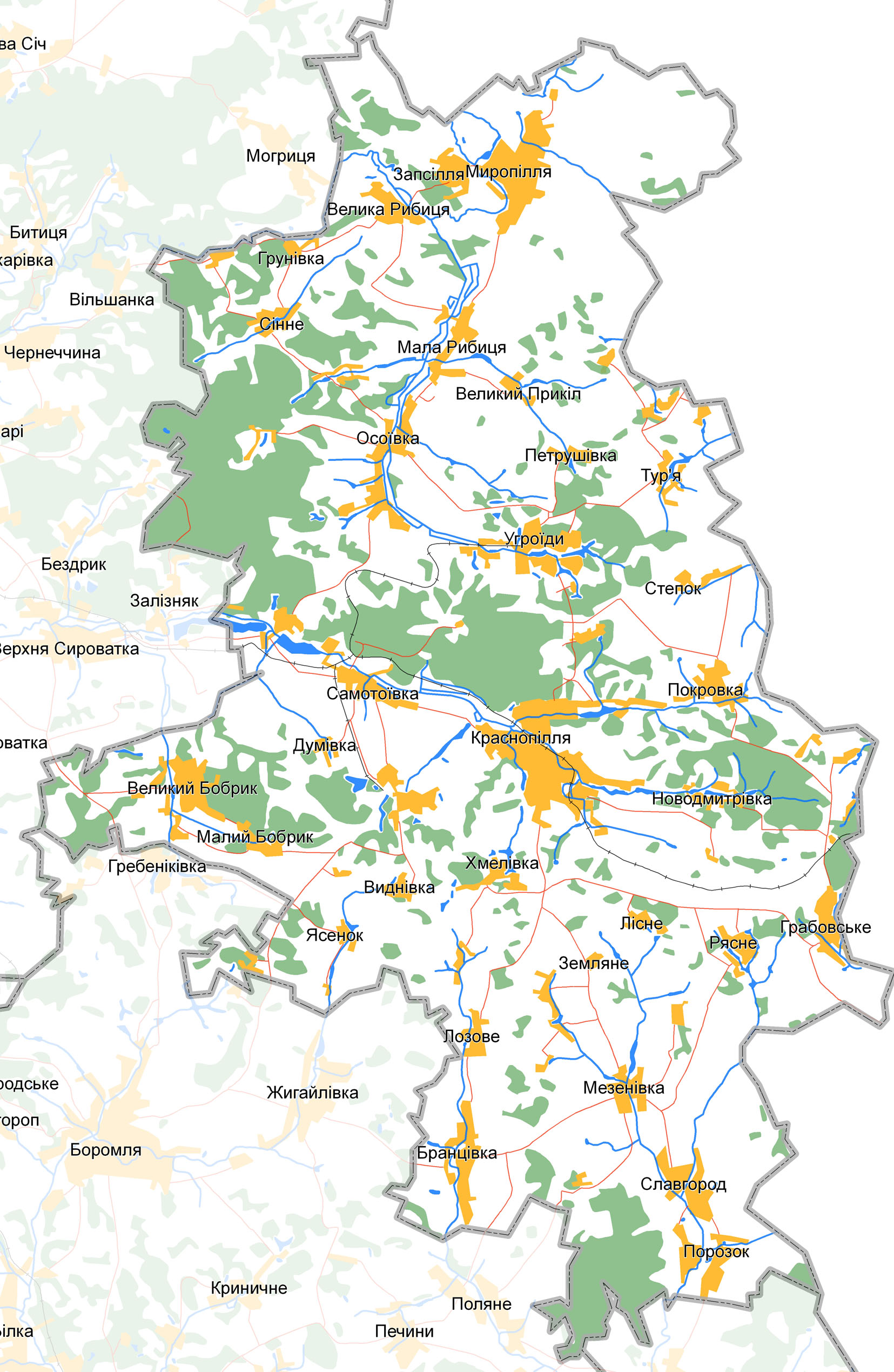 Карта Краснопільського району: Карта Краснопільського району